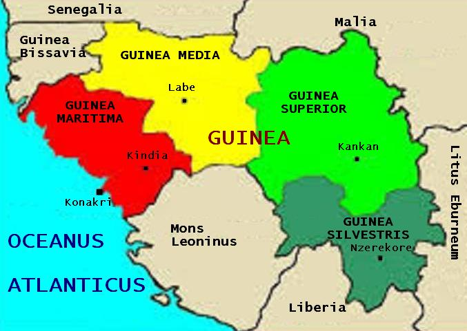 Regiones naturales Guineae